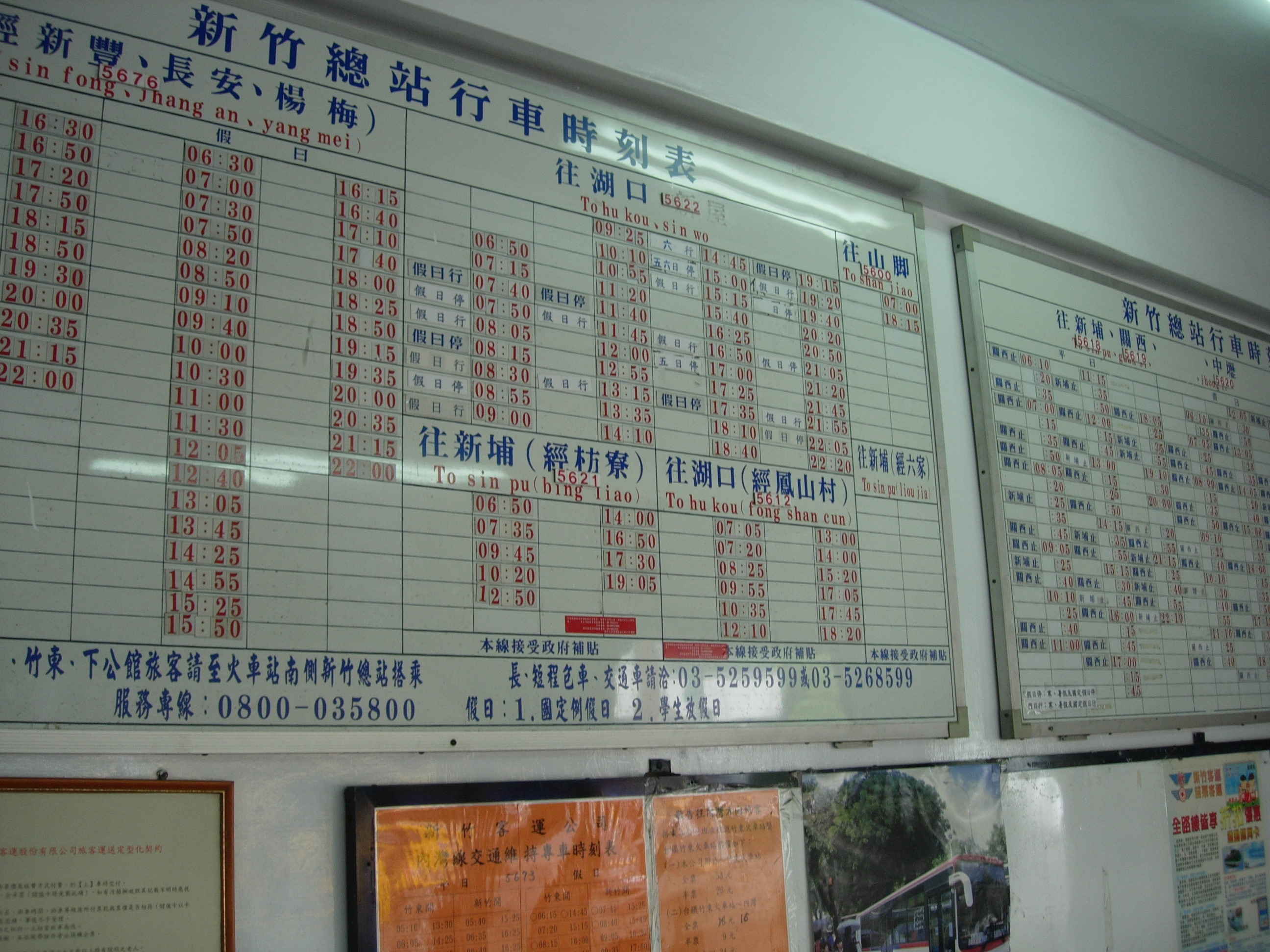 中文（台灣）: 新竹客運新竹北站時刻表